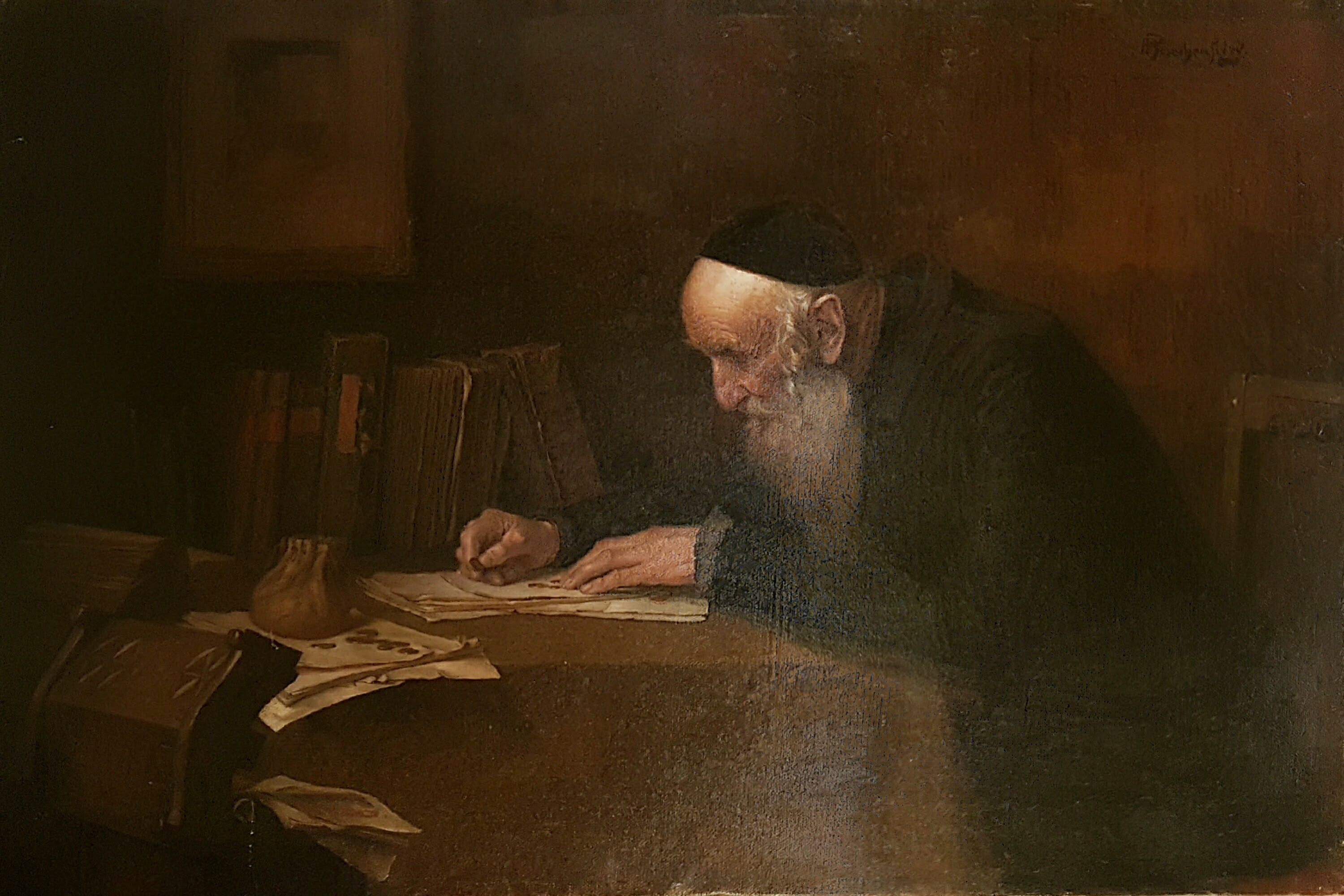 Ein alter Rabbi bei der Tagesabrechnung, Privatbesitz, undatiert.